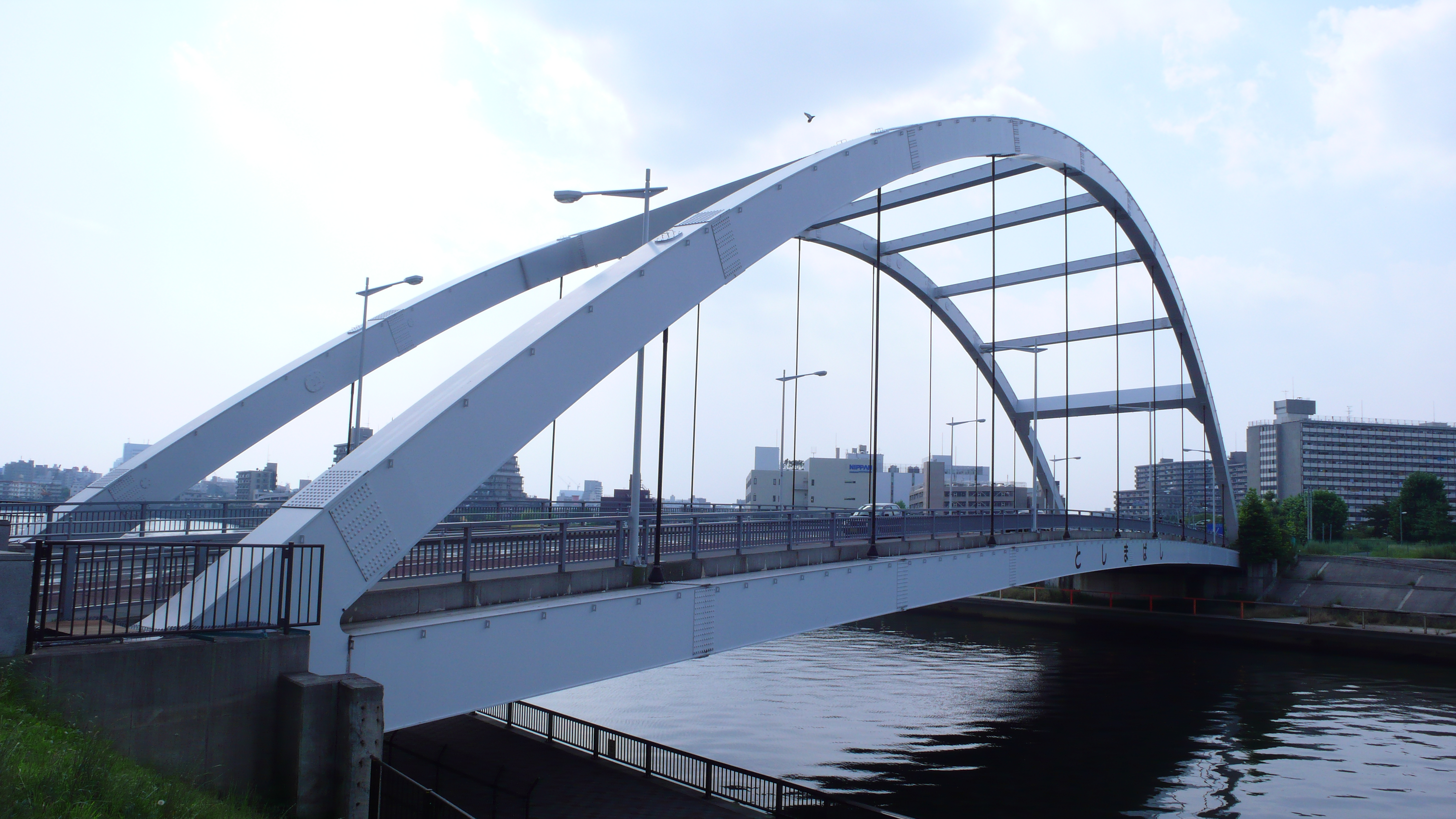 隅田川に架かる豊島橋を東京都足立区側より撮影